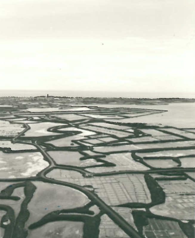 Batz-sur-Mer - Photo aérienne - mai 1977